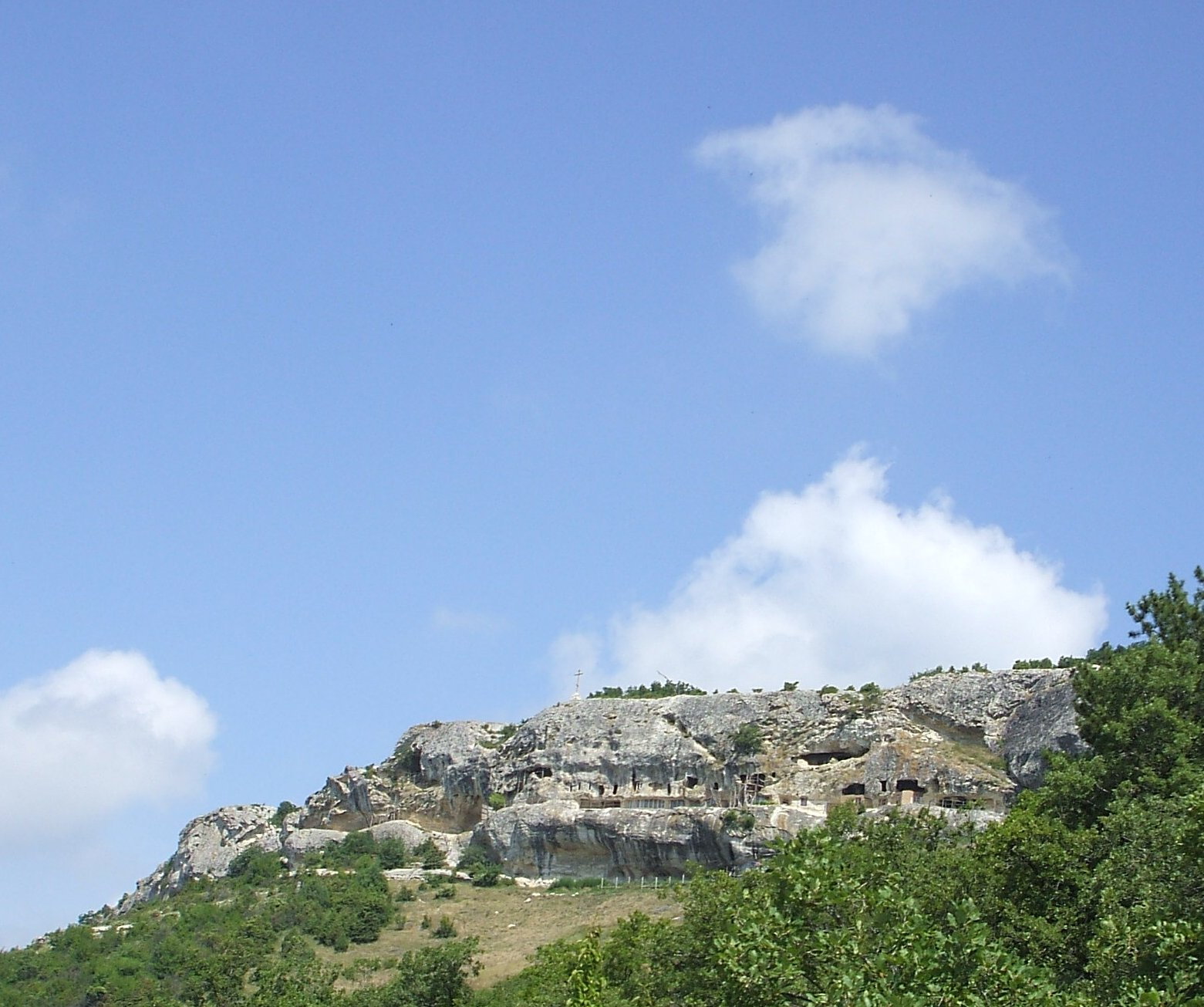 Челтер Мармара вид со стороны Терновки